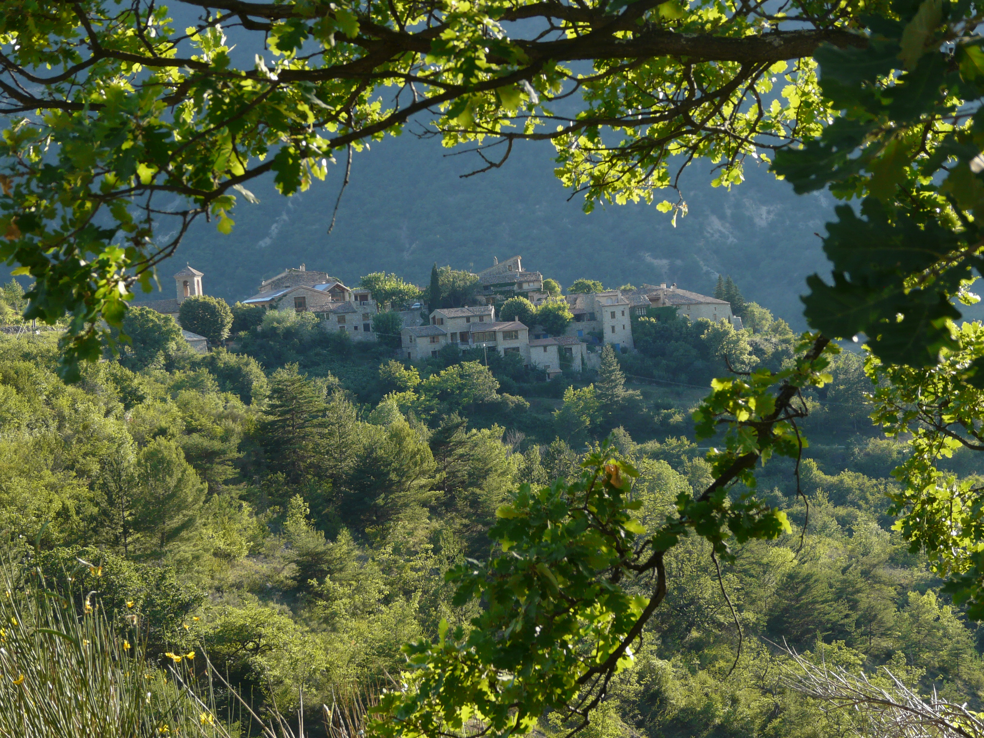 Le village de Montaulieu dans la Drôme, vu depuis le versant Est de la vallée